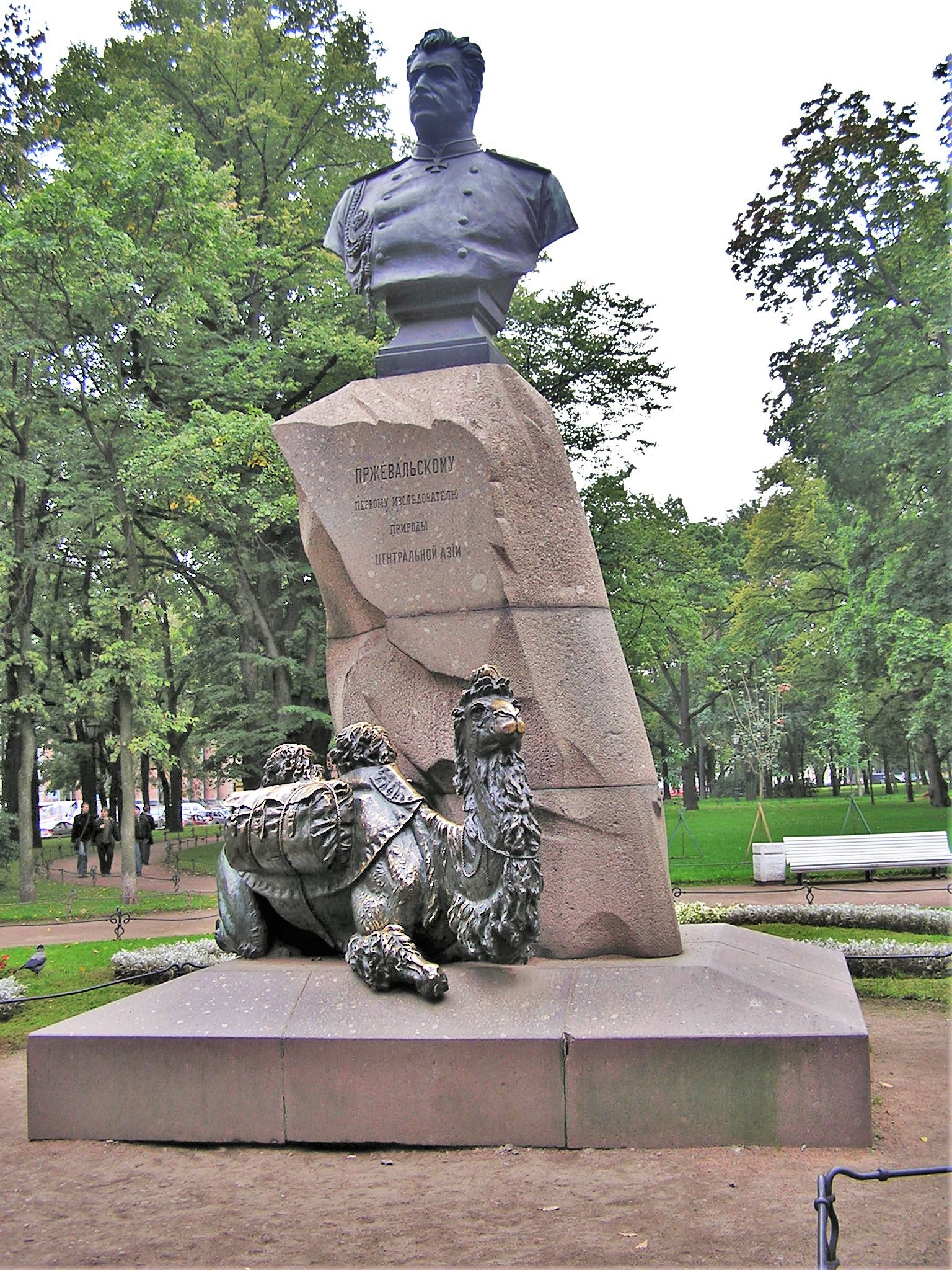 Санкт-Петербург. Памятник Пржевальскому в Александровском саду